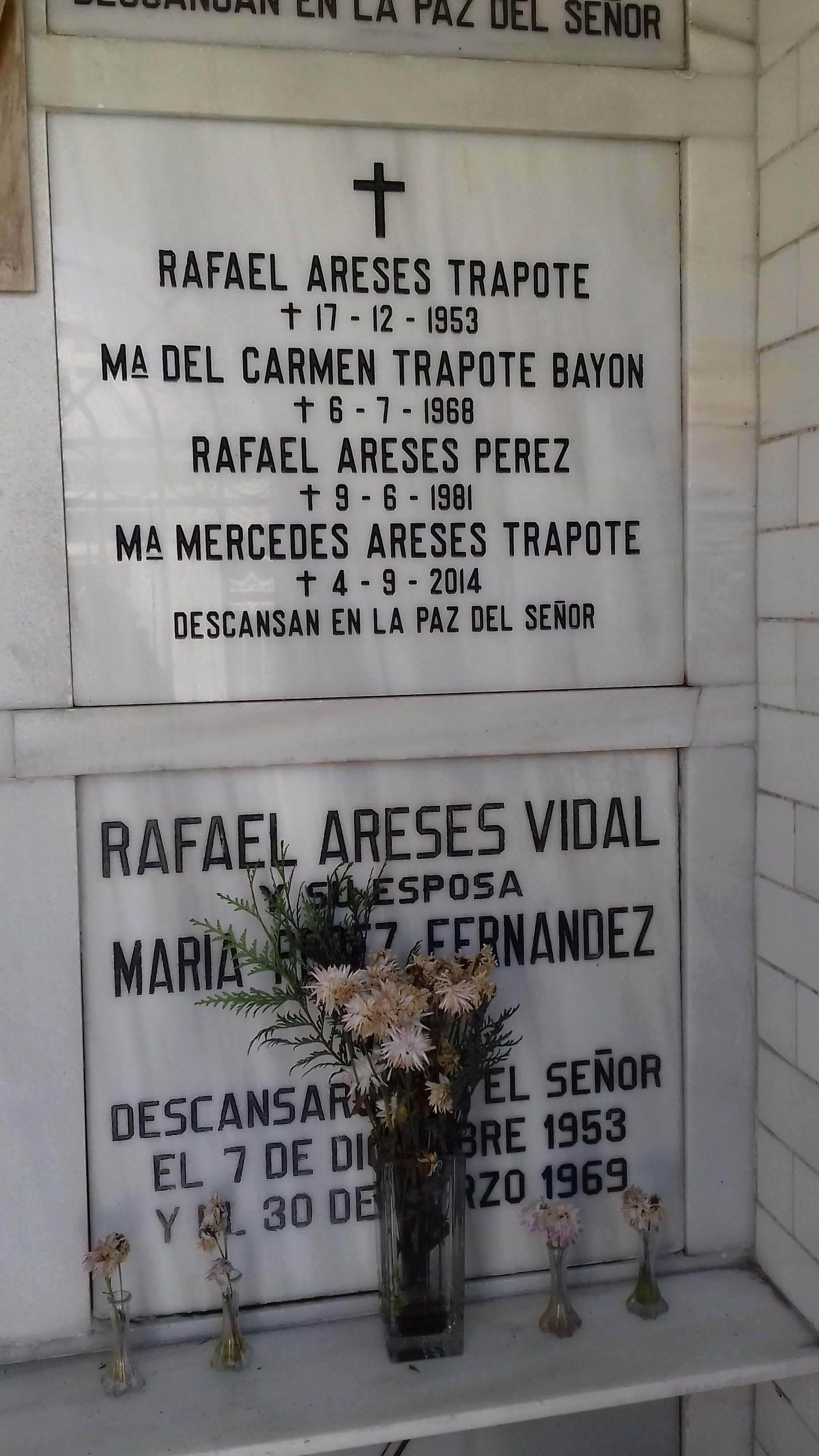 Lápidas de Rafael Areses Trapote, María del Carmen Trapote Baión, Rafael Areses Pérez, María Mercedes Areses Trapote, Rafael Areses Vidal e María Pérez Fernández